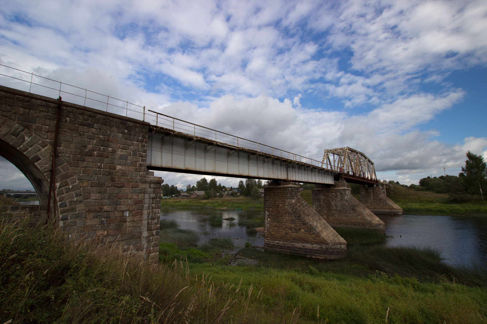 Железнодорожный мост через Мологу, построен в 1928м году